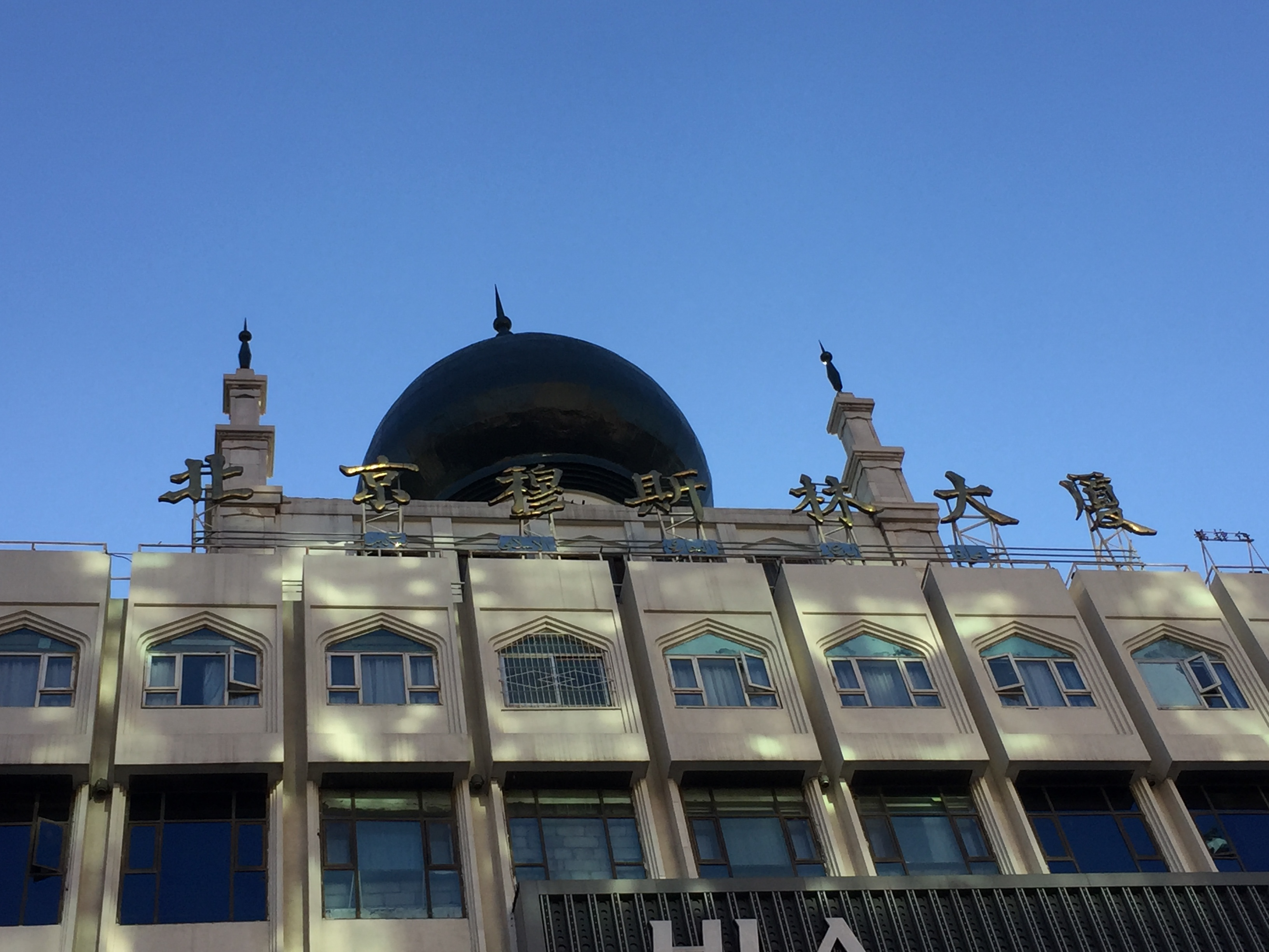 中文（中国大陆）: 北京穆斯林大厦，位于王府井。